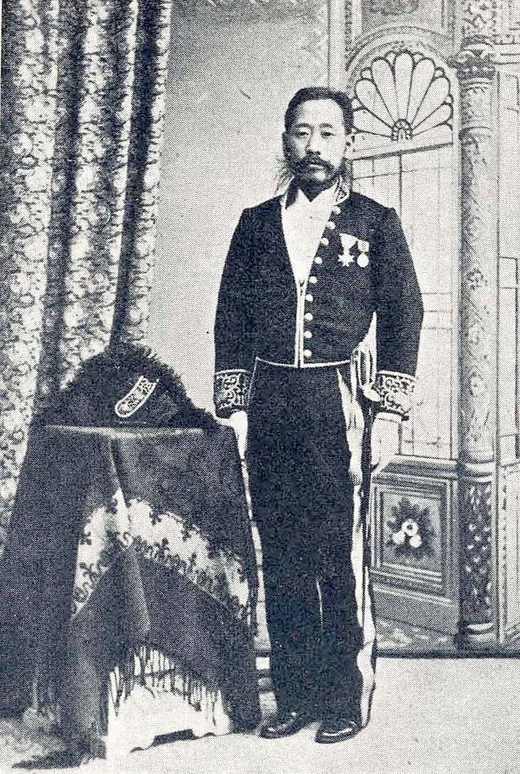 尾立維孝 Odate Koretaka